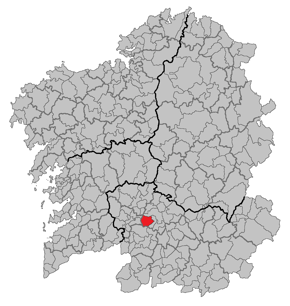 Mapa coa localización do concello de Toén.